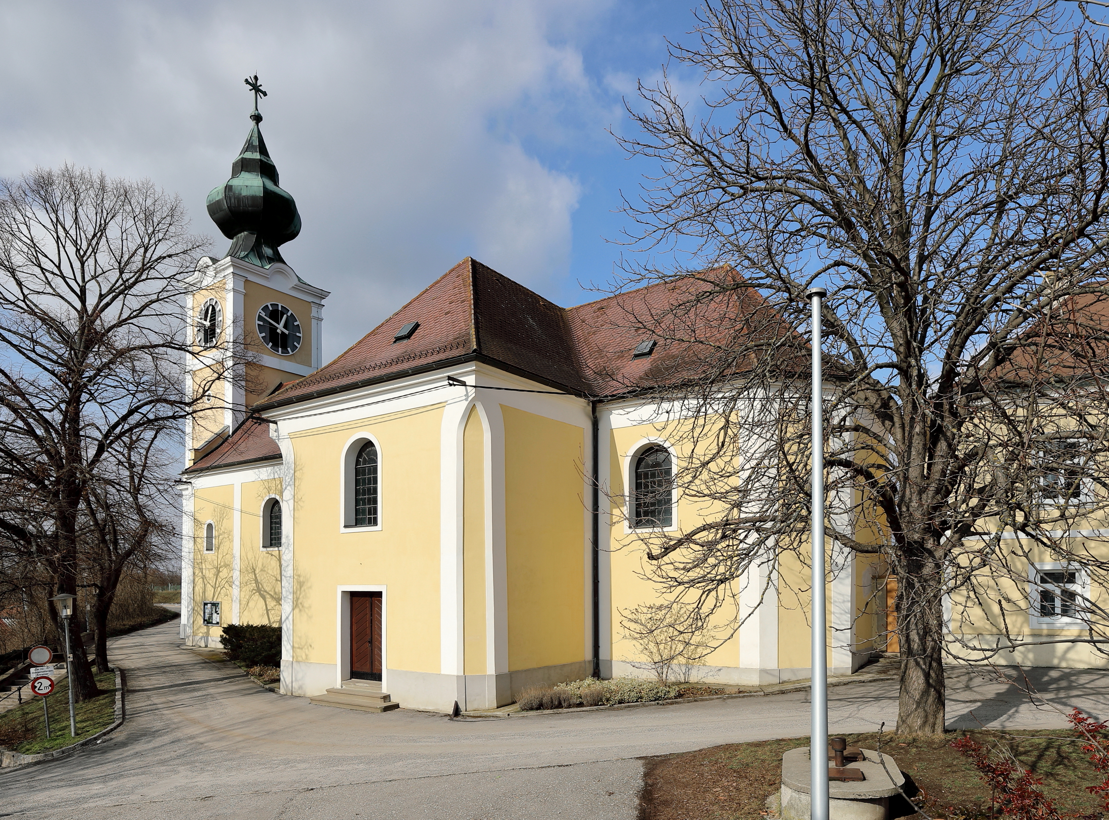 Die röm.-kath. Pfarrkirche hl. Leopold in Götzendorf, ein Ortsteil der niederösterreichischen Gemeinde Velm-Götzendorf. Die weithin sichtbare barocke Kirche wurde von 1766 bis 1772 errichtet und 1824 erweitert.